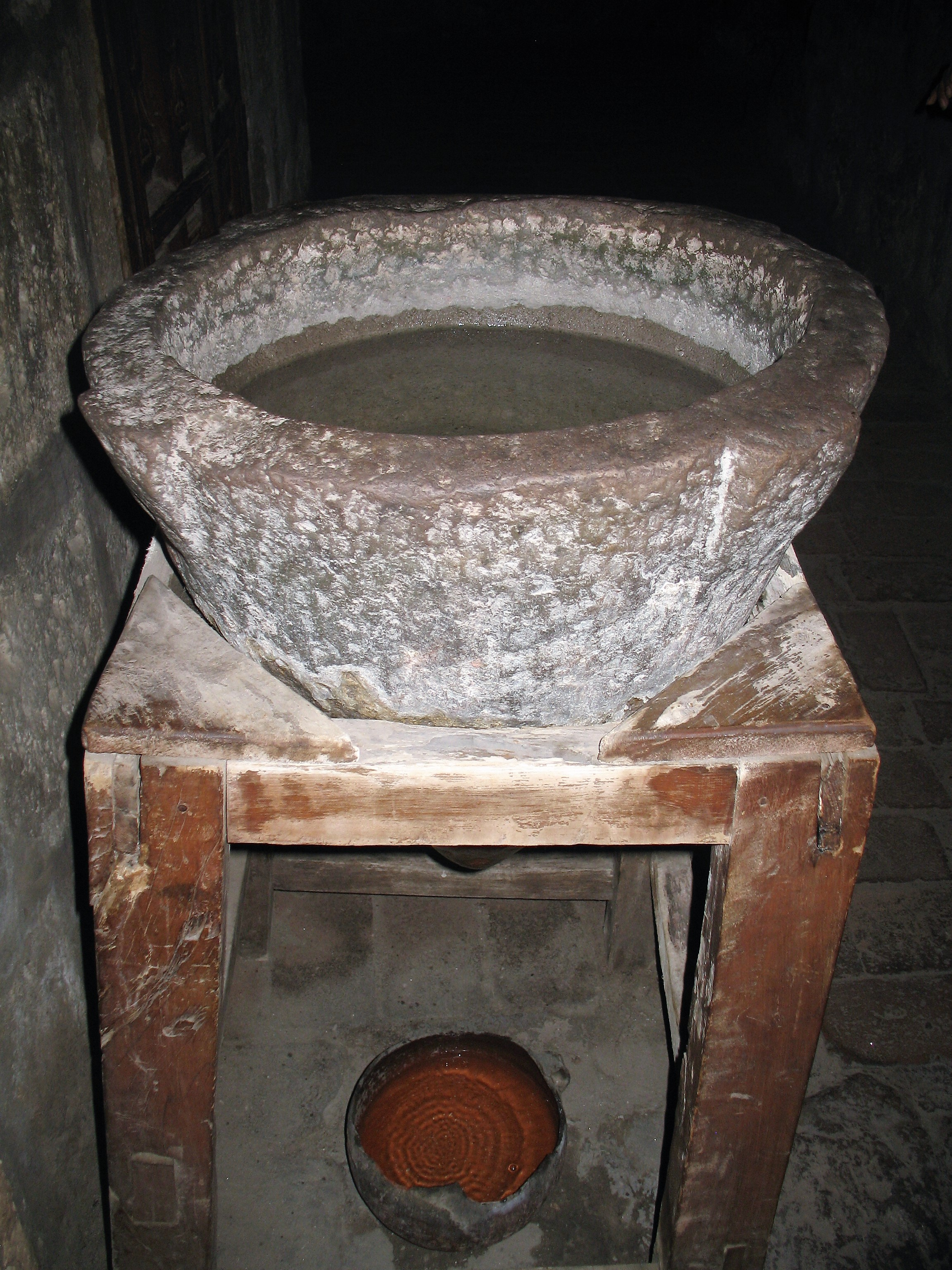 Filtre à eau, couvent monastère Santa Catalina, Arequipa